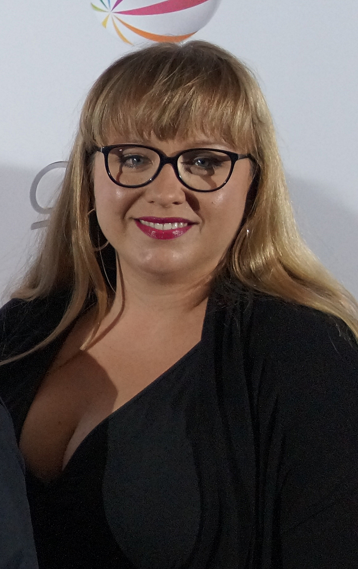 Vera Kasimir bei der Premiere des Sat.1 Filmes "Volltreffer", am 29.9.16, in Dortmund.